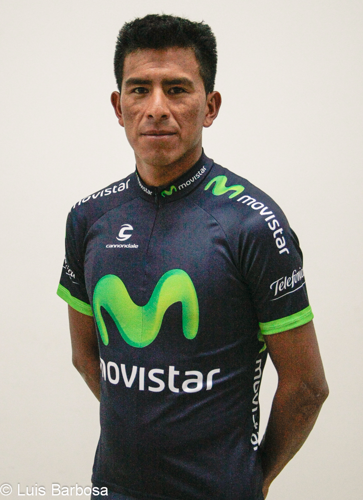 Photo officielle d'Óscar Soliz dans l'équipe Movistar Team America (saison 2013)